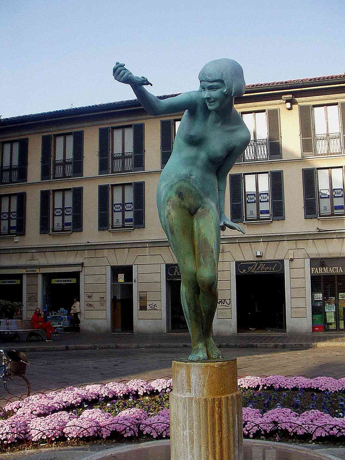 Monza fontana in Piazza Roma